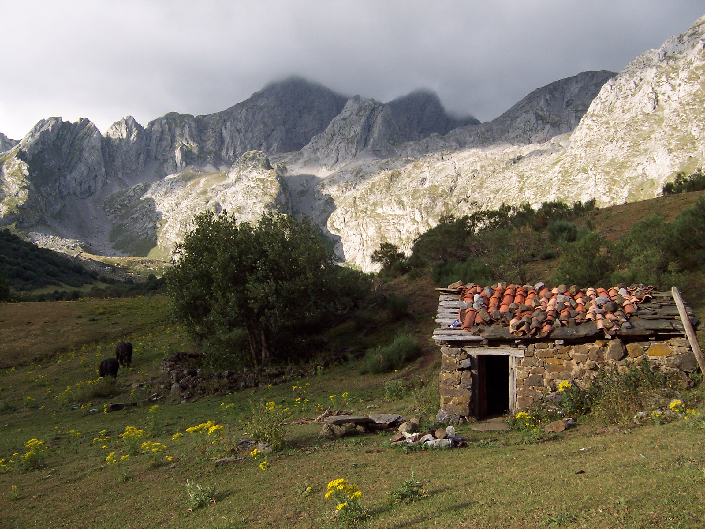 En plenas brañas de Agüeria This is a photography of a Special Area of Conservation in Spain with the ID: ES1200011. Natura2000 entry, EEA entry